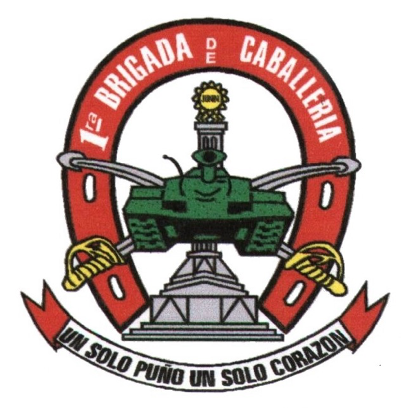 Unidad del ejército del Perú